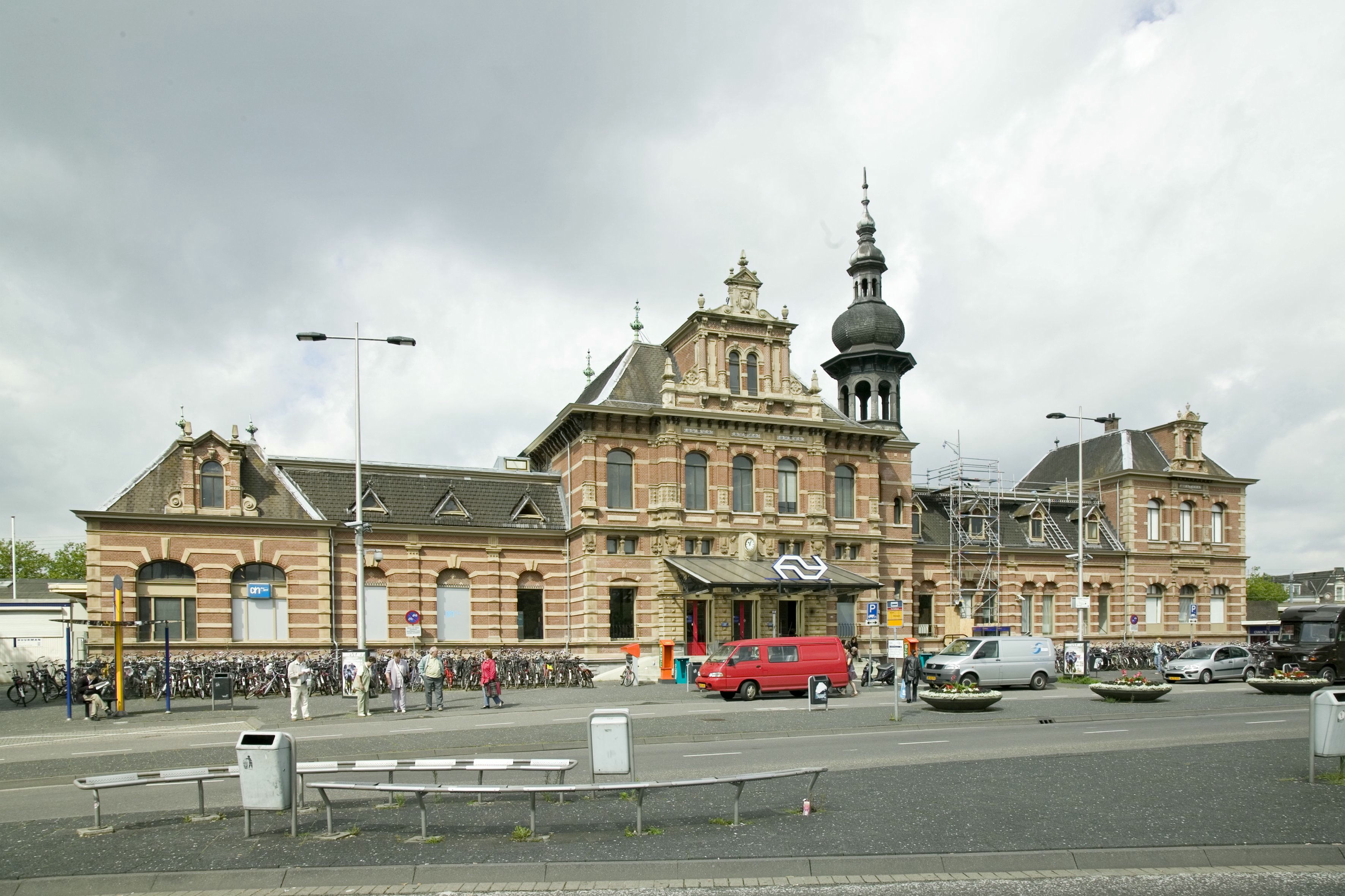 Centraal Station: Overzicht voorzijde, situering